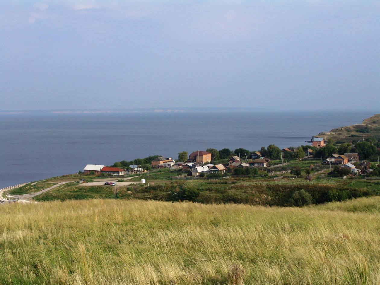 Самарская обл., село Новодевичье